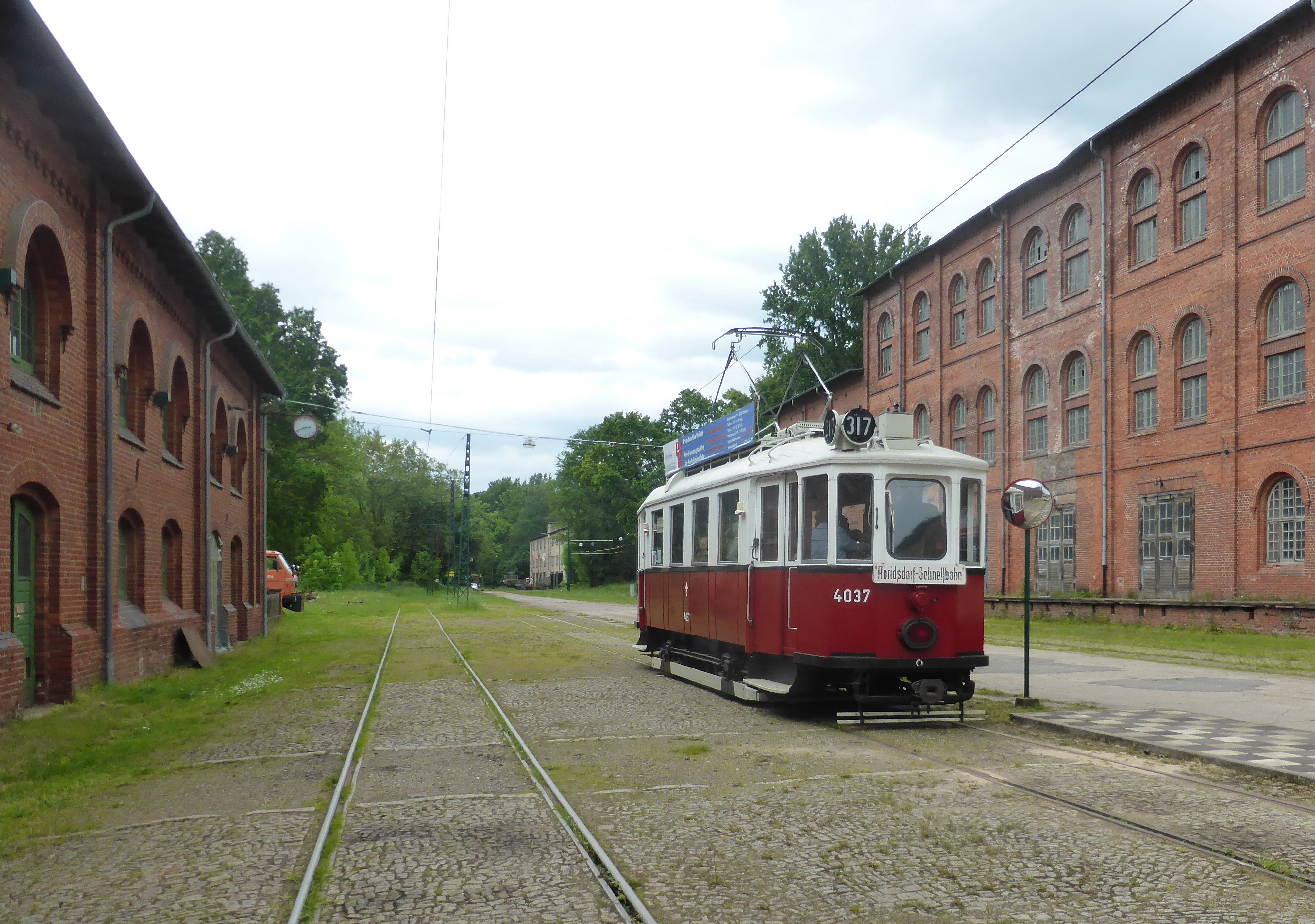 Eine aus Wien stammende Straßenbahn (Typ M, Nr. 4037) im Hannoverschen Straßenbahn-Museum.